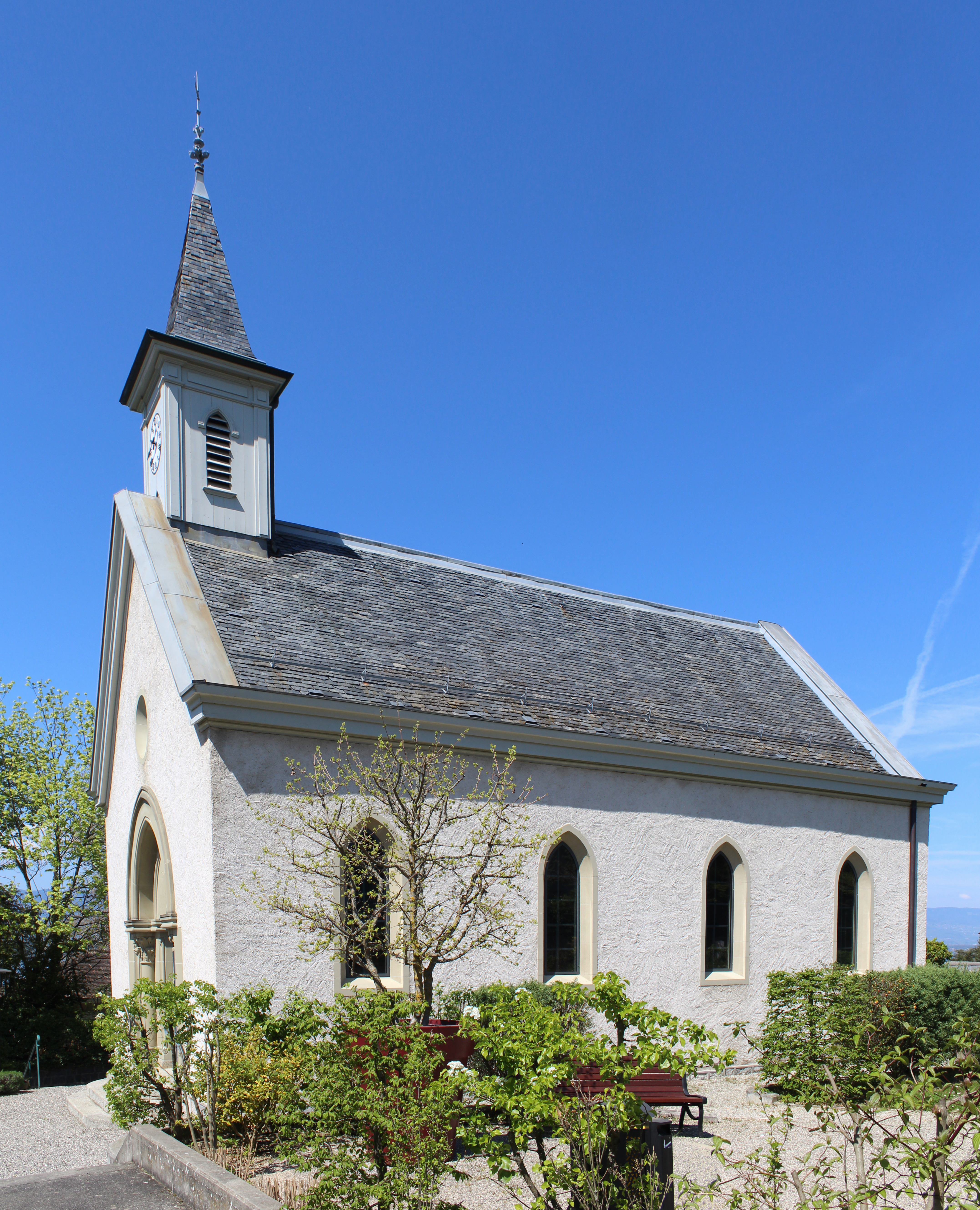 Chapelle d'Anières.